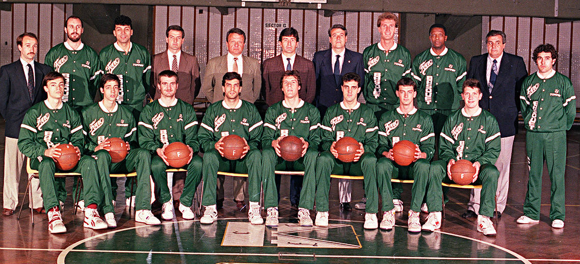 Equipo de Ferro (BA) campeón de la LNB en 1989